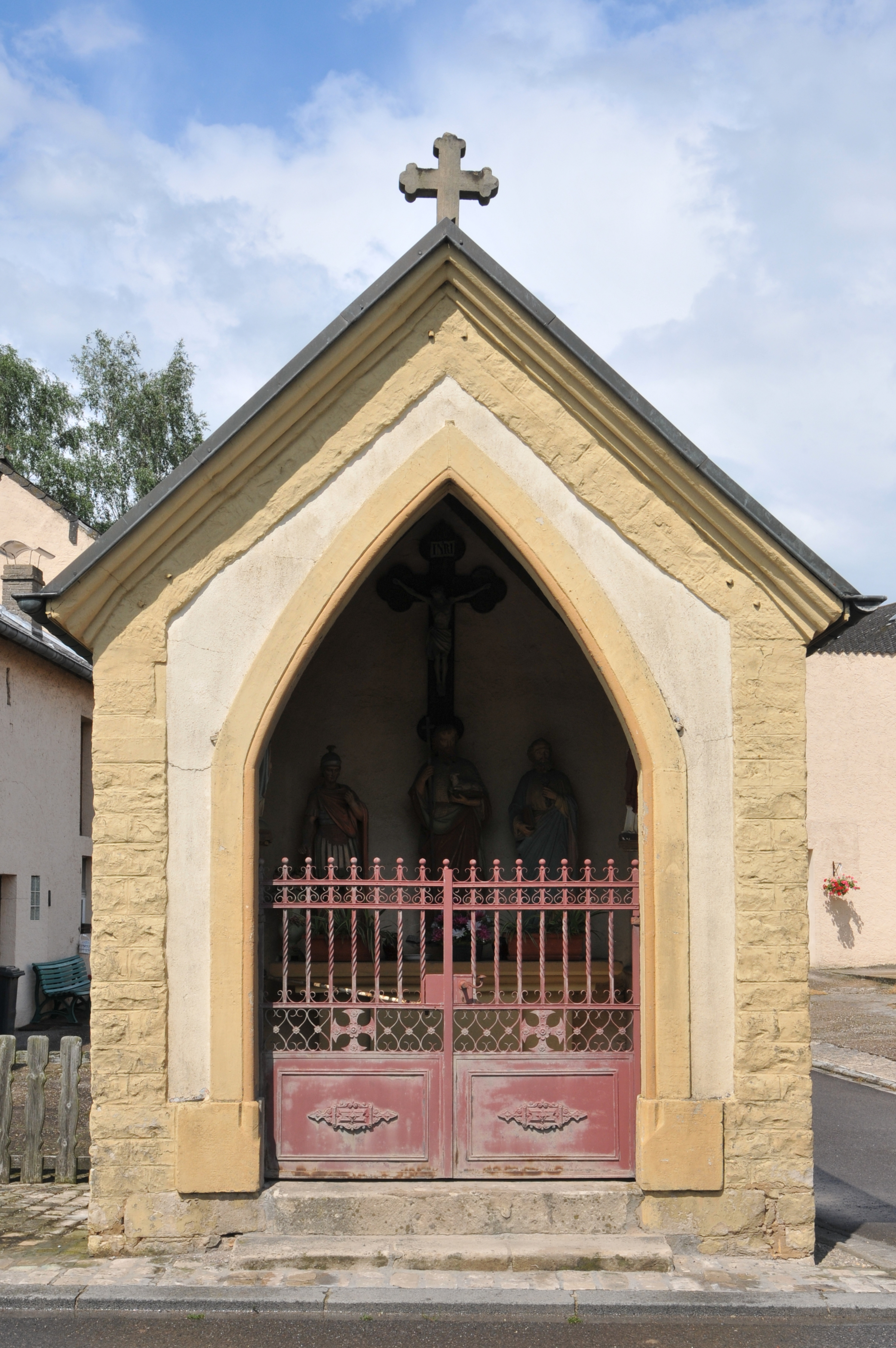 Eng Kapellchen zu Aassel.